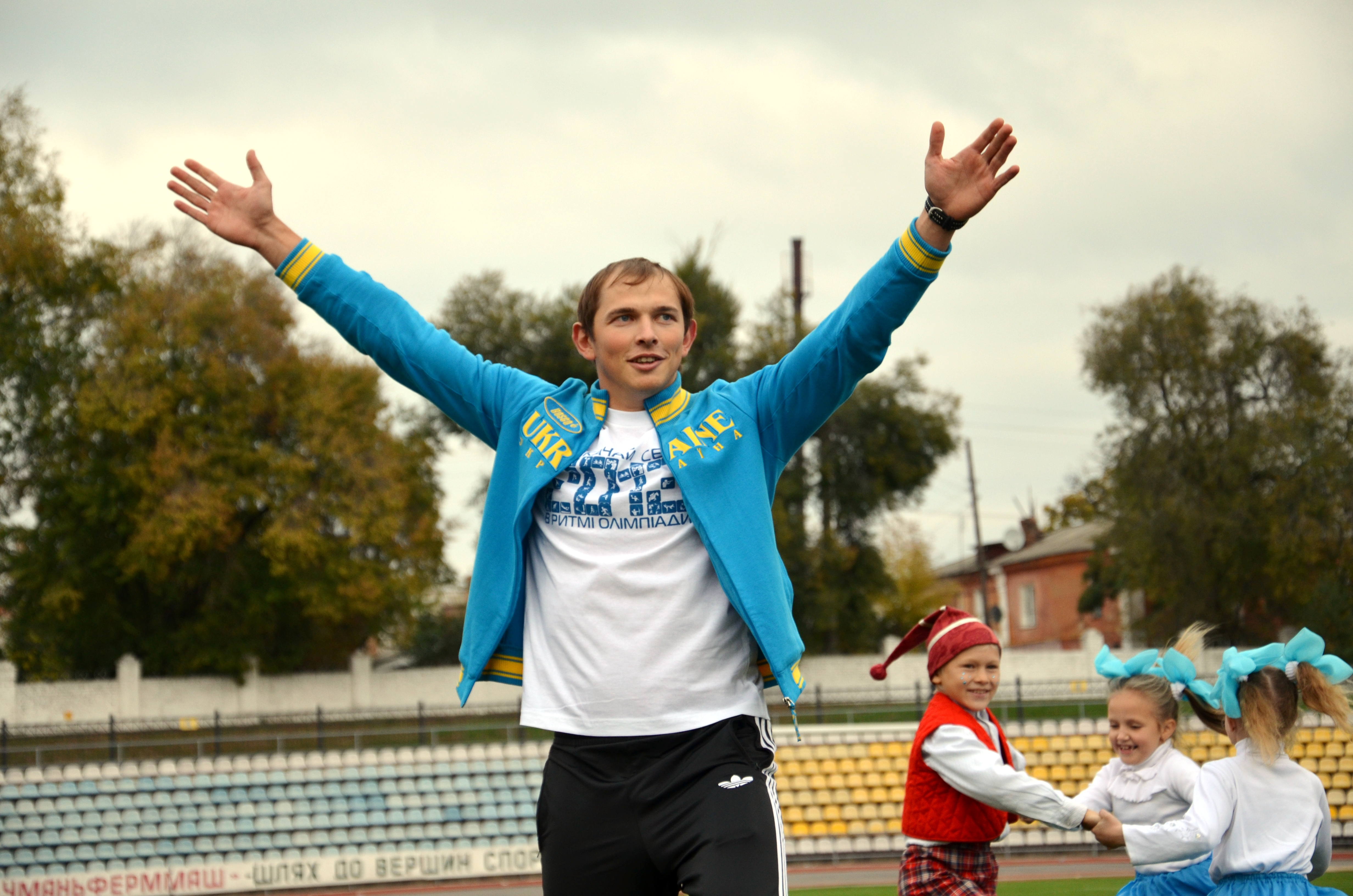 Юрій Чебан на Олімпійському уроці "прокачай себе в ритмі Олімпіади". м. Умань, 19 жовтня 2012 року